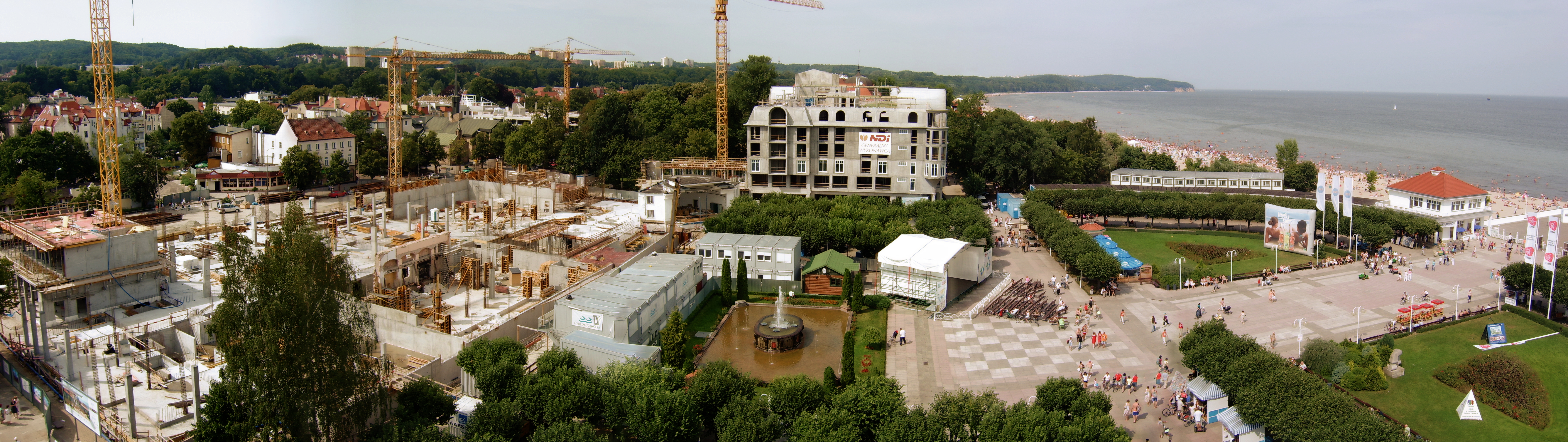 Centrum Sopotu widziane z latarni morskiej